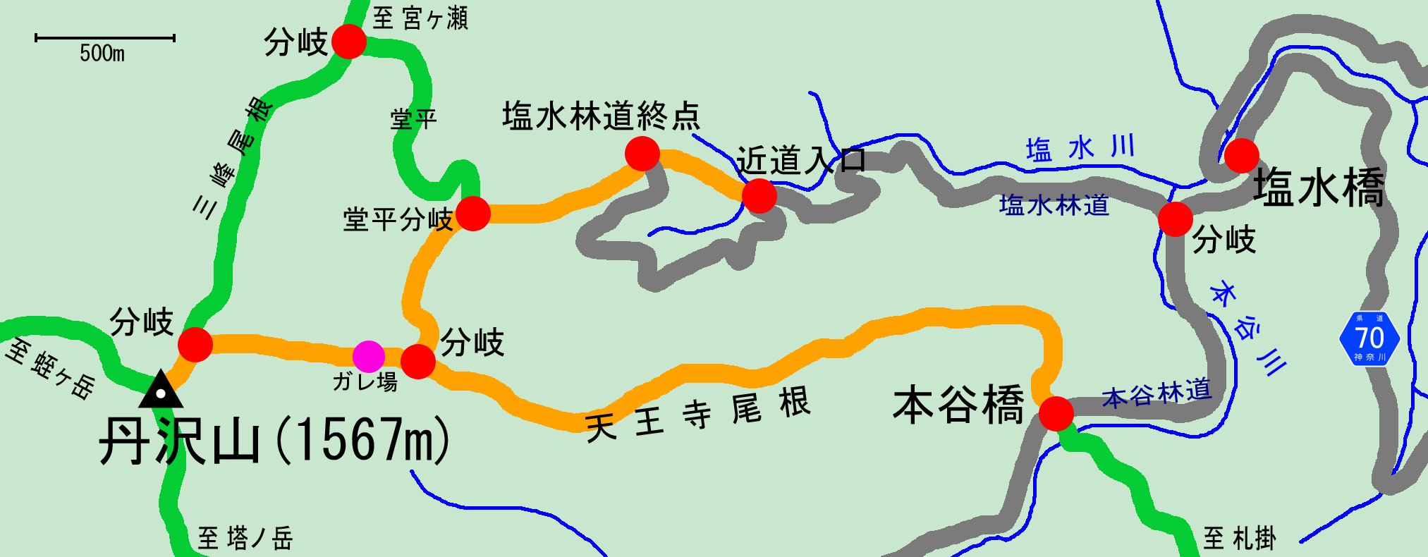 丹沢山地・天王寺尾根登山道の地図